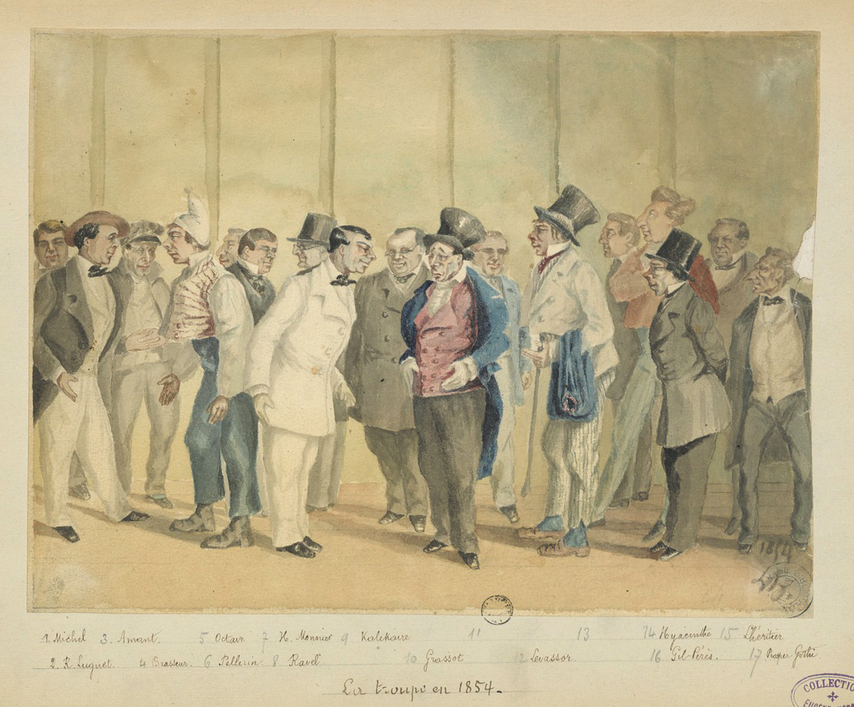 La troupe du théâtre du Palais-Royal : de gauche à droite, Marc-Michel, Luguet, Amant, Brasseur, Octave, Pellerin, Monnier, Ravel, Kalekaire, Paul Grassot, Levassor, Hyacinthe, Gil-Pérès, Lhéritier et Prosper Gothi.